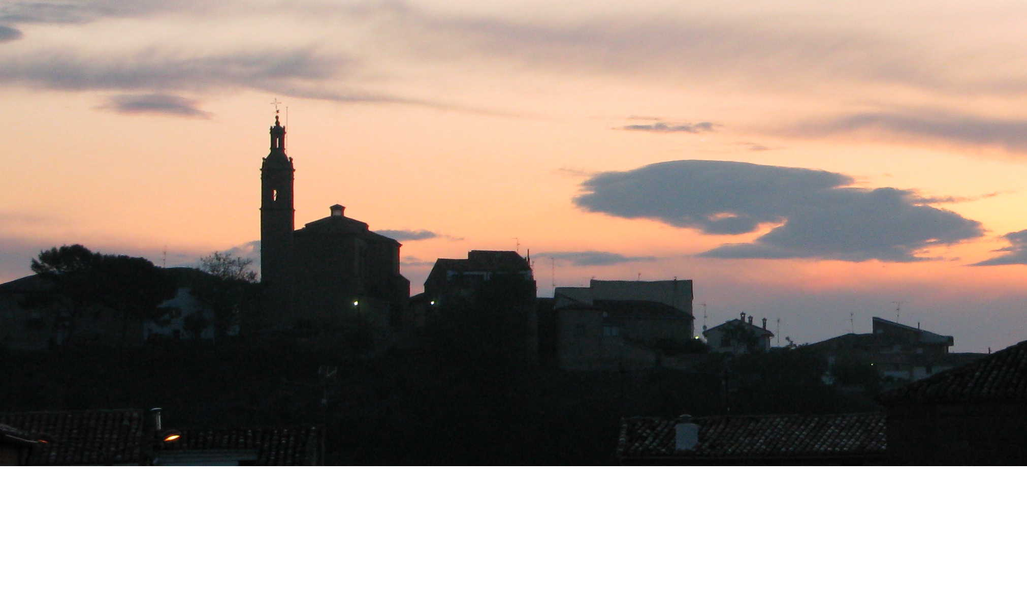 sansol at night